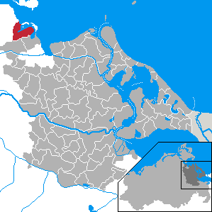 Mesekenhagen, Landkreis Ostvorpommern, Mecklenburg-Vorpommern